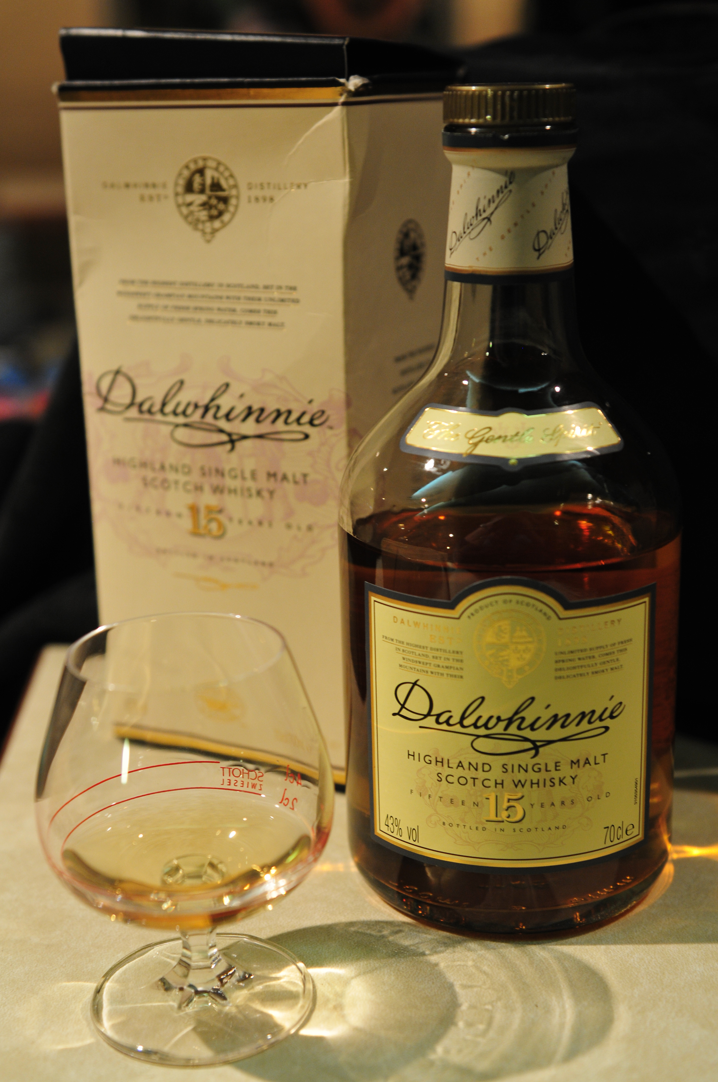 Whisky Dalwhinnie